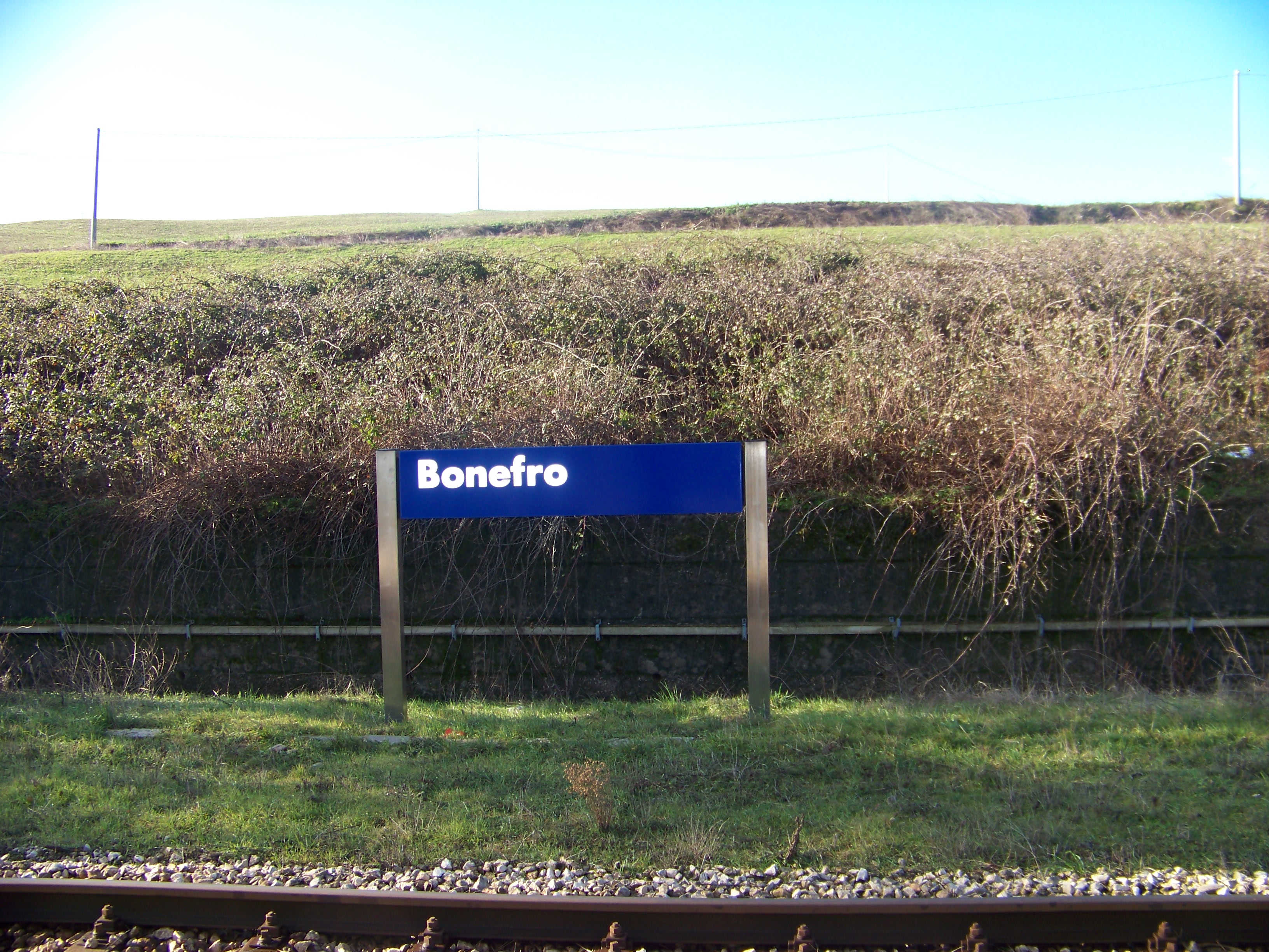 Stazione di Bonefro-Santa Croce